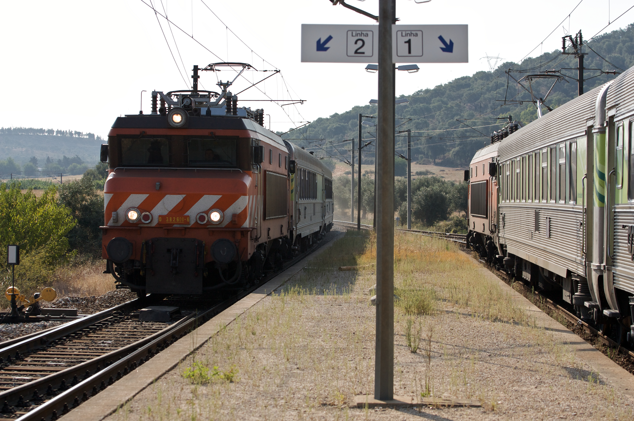 cruzamento com o Intercidades 541 [Lisboa • Santa Apolónia - Covilhã]. Tipo: Comboio Intercidades 540 [Covilhã - Lisboa • Santa Apolónia] Local: Estação de Santa Margarida [Linha da Beira Baixa, PK 124] Data e hora: 15 de Setembro de 2009 [09h51] Material: Locomotiva 2608 + 3 carruagens Sorefame Renovadas